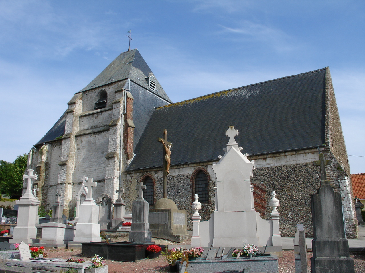 Église d'Escœuilles .